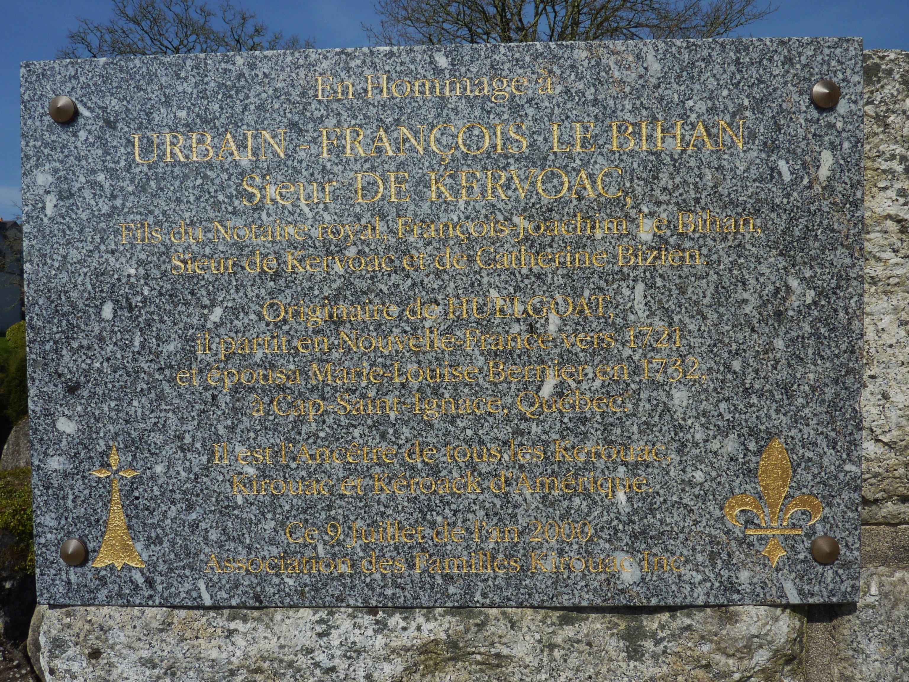 Plaque commémorative en l'honneur de Jack Kerouac